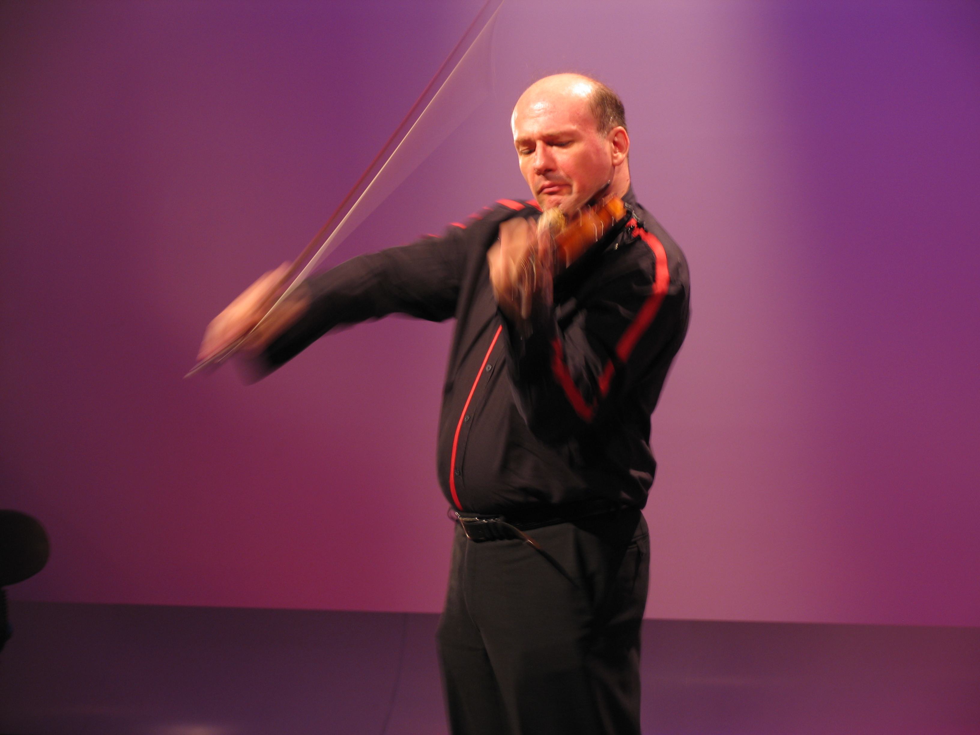 エルノローザ演奏写真